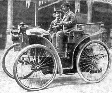 L'éclair en 1895 (des frères Michelin au Paris-Bordeaux-Paris, première voiture sur pneumatiques), Histoire de l'automobile, Pierre Souvestre, éd. H. Dunod et E. Pinat, 1907 (ASIN B001BPBE58) p.294